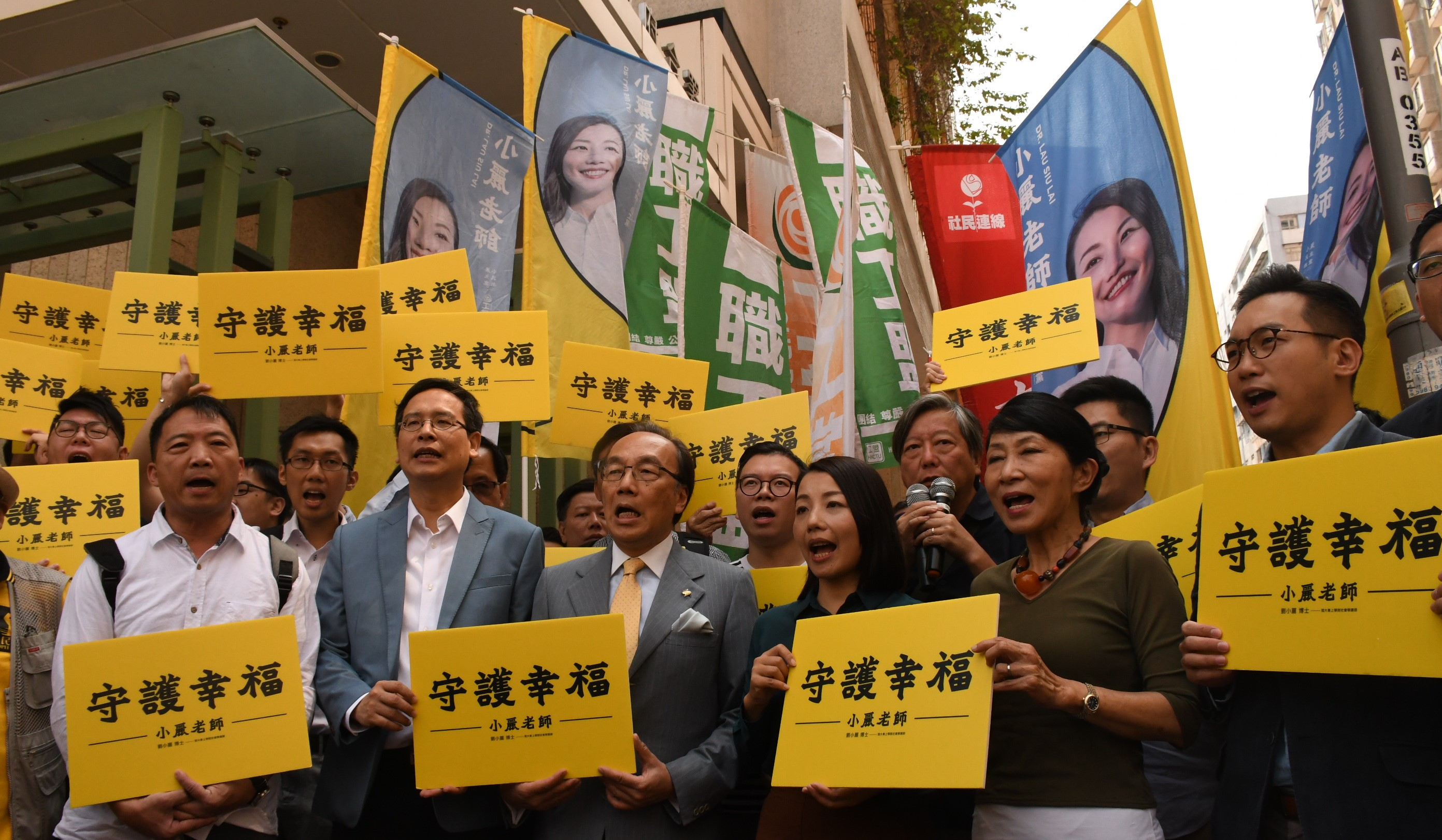 香港民主派多個政黨及政團支持劉小麗參選立法會九龍西補選。(美國之音湯惠芸)